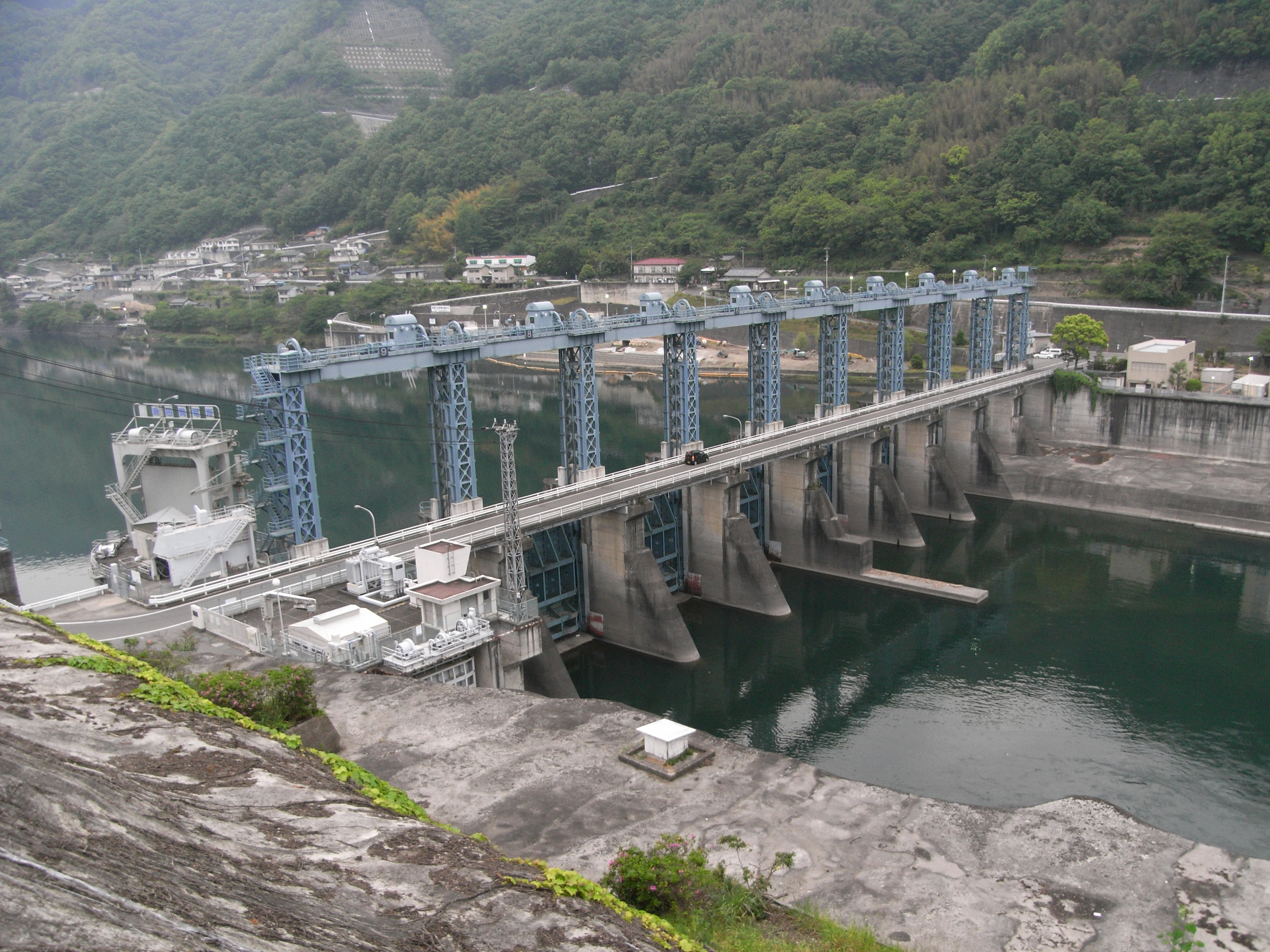 Dam